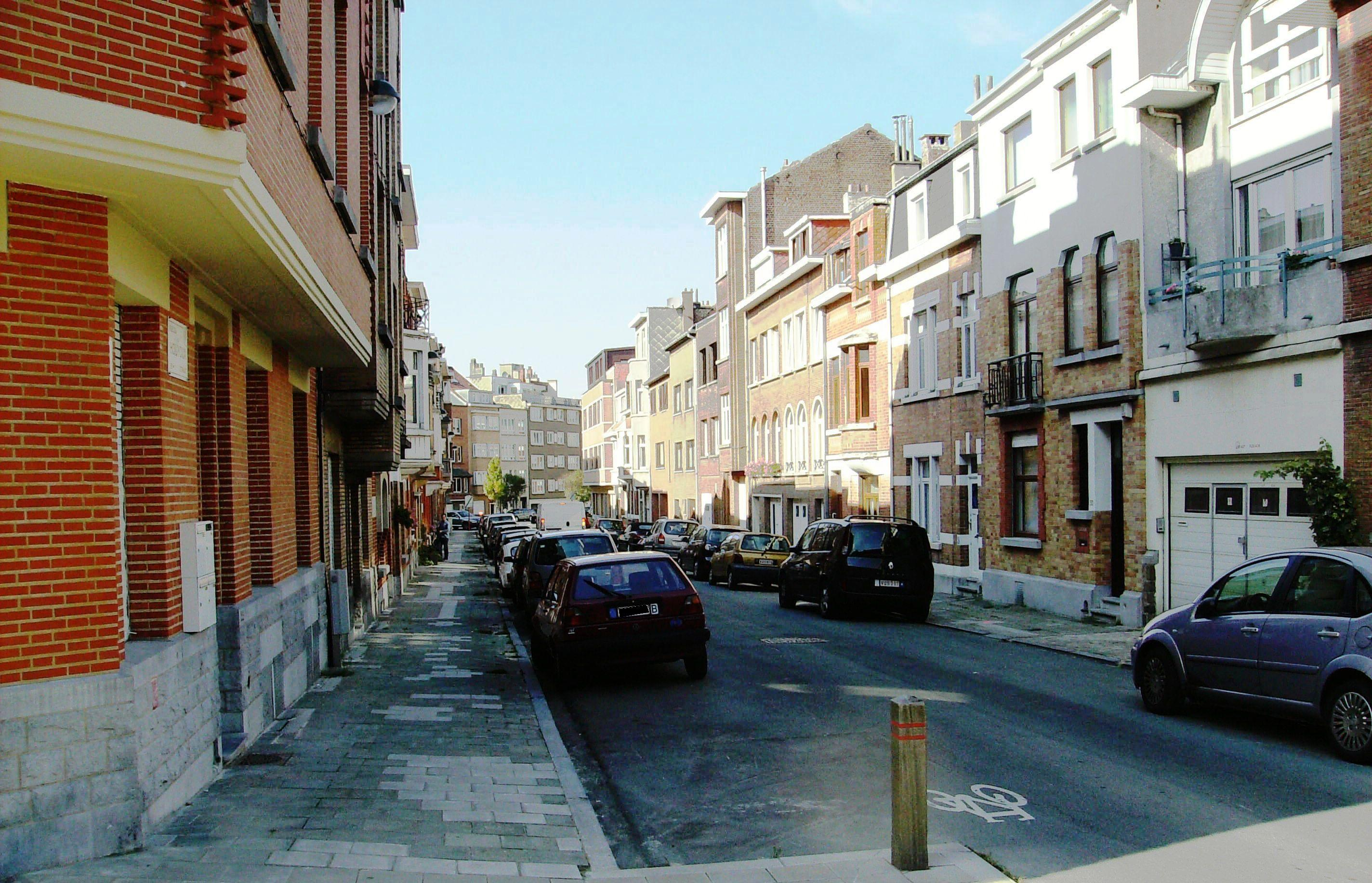 rue du Houyoux Auderghem